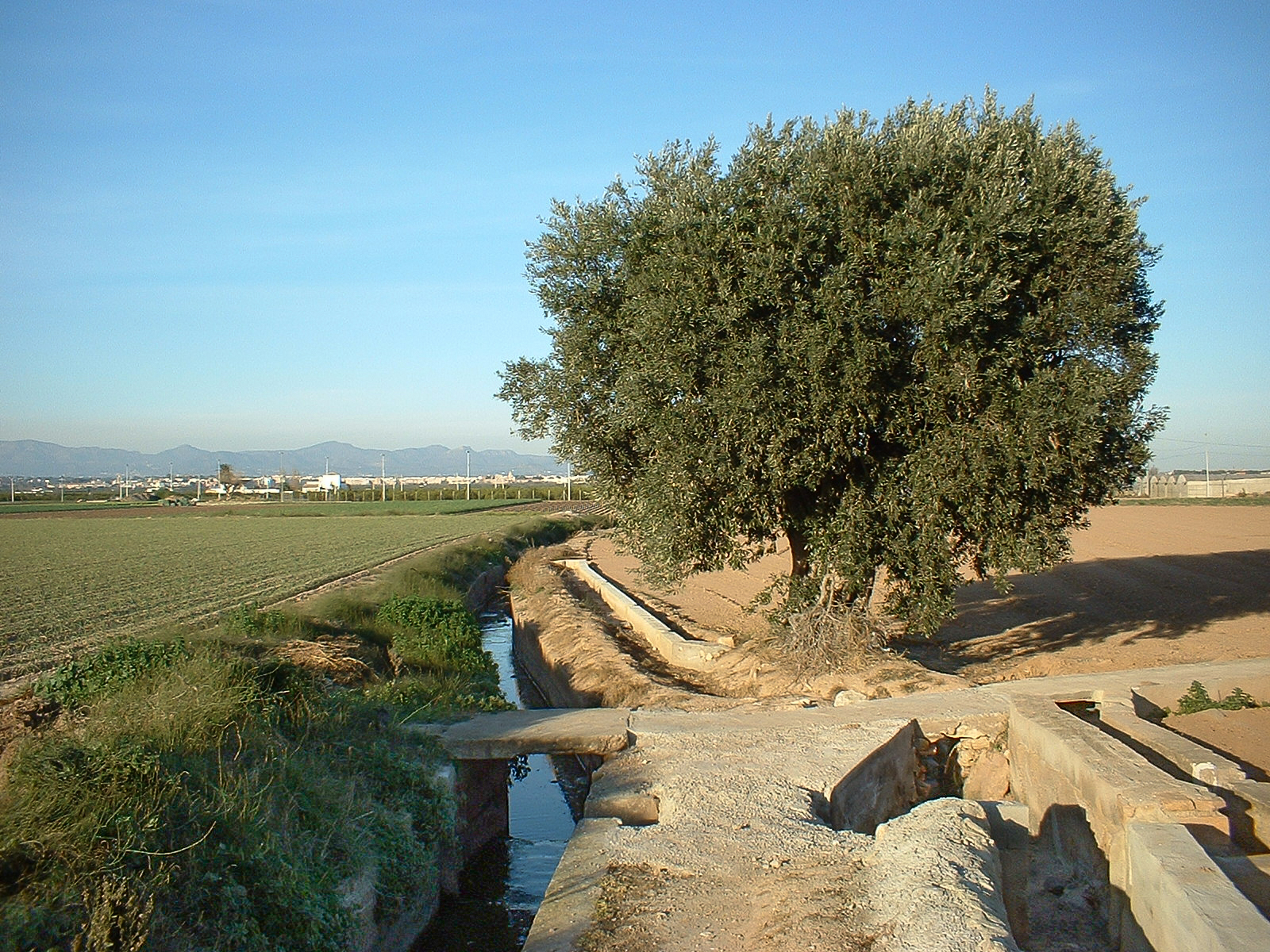 Vista típica de la Huerta de Valencia. Fotografía tomada en Burjasot (Valencia, España).